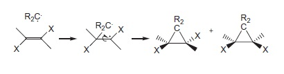 Estereoquímica de reação de tripletos